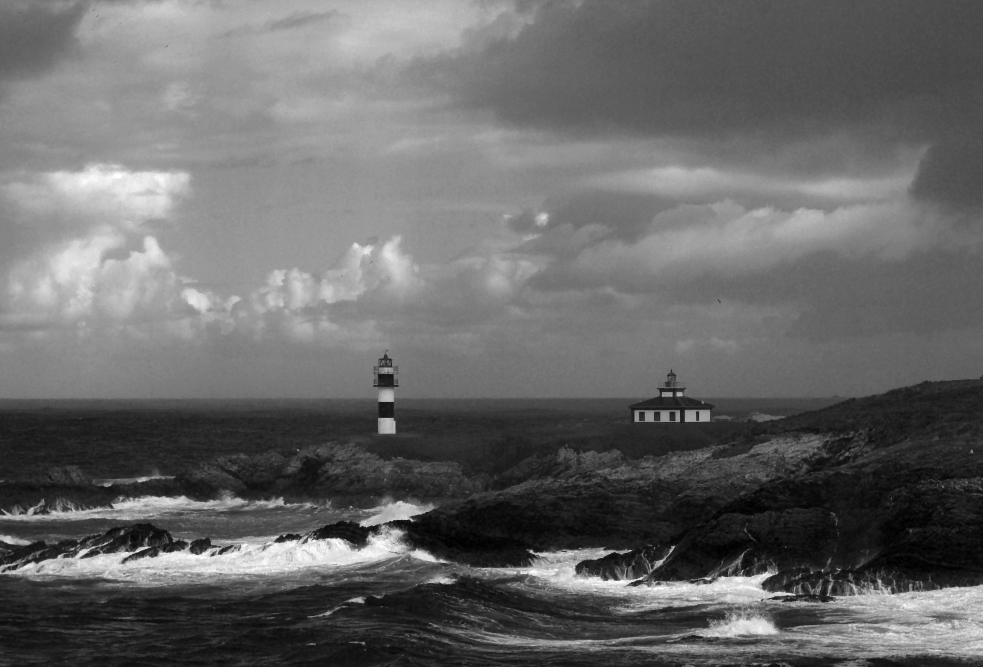 Faros viejo y moderno de Isla Pancha en Ribadeo (Mariña Lucense)